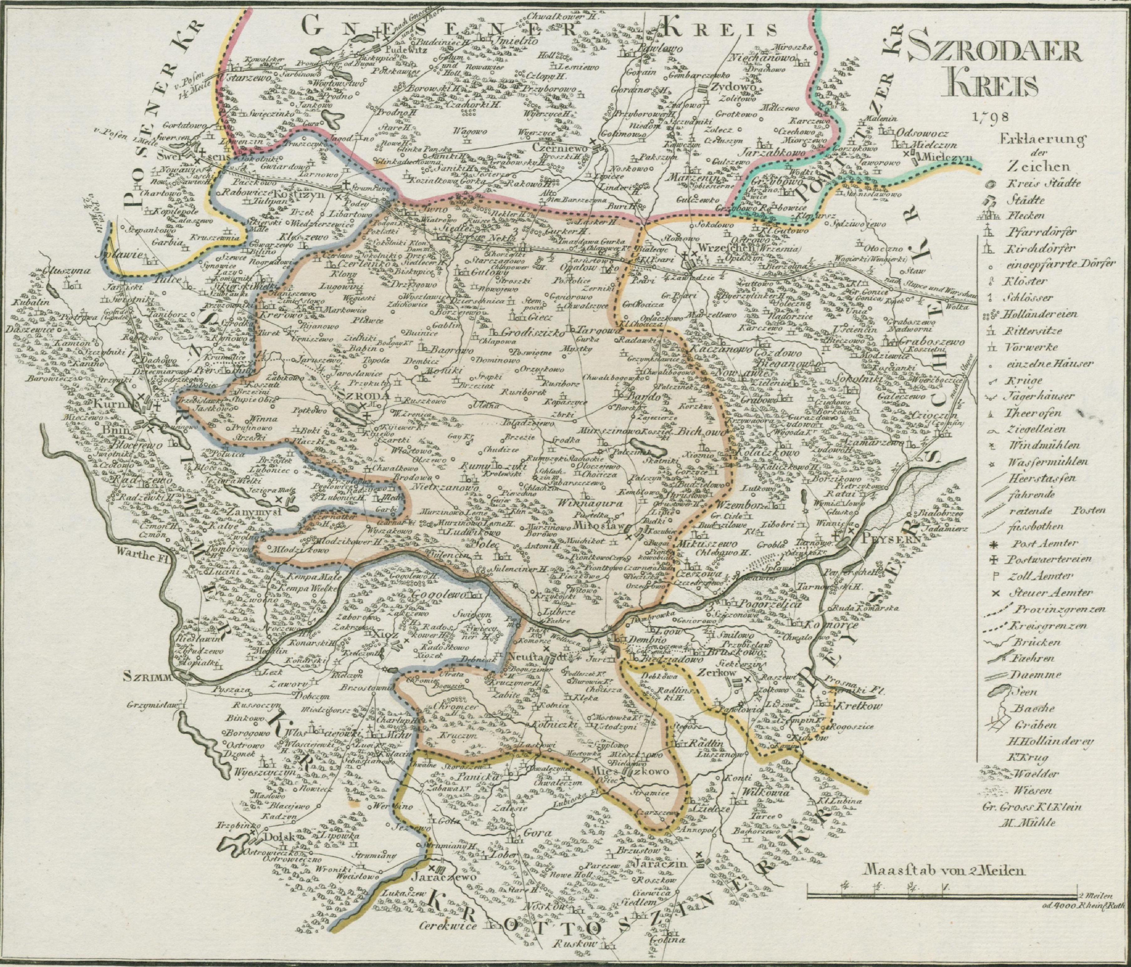 Map of "Kreis Schroda" as of 1798